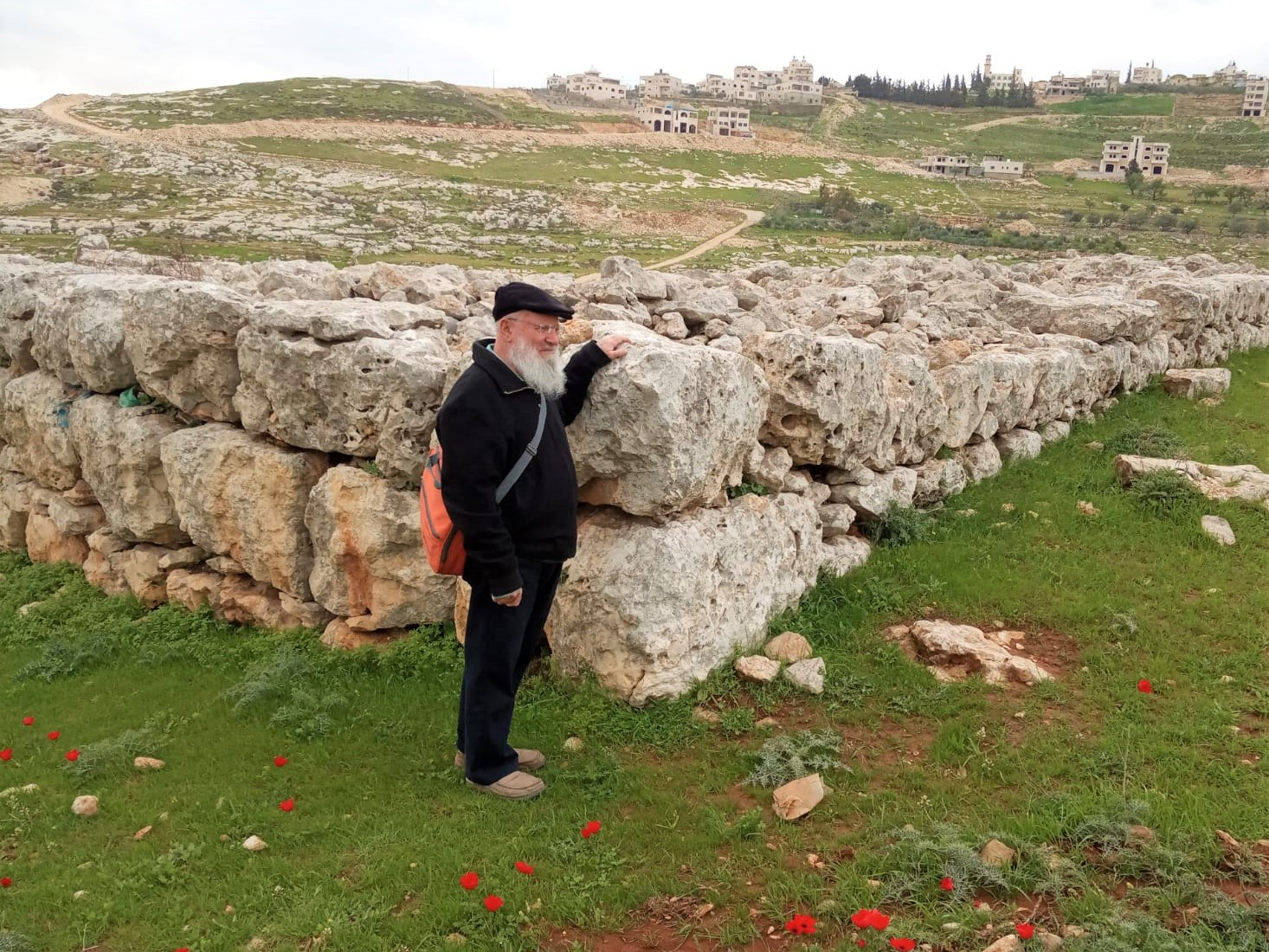 פרופסור יואל אליצור בסיור בקבר מרץ 2019